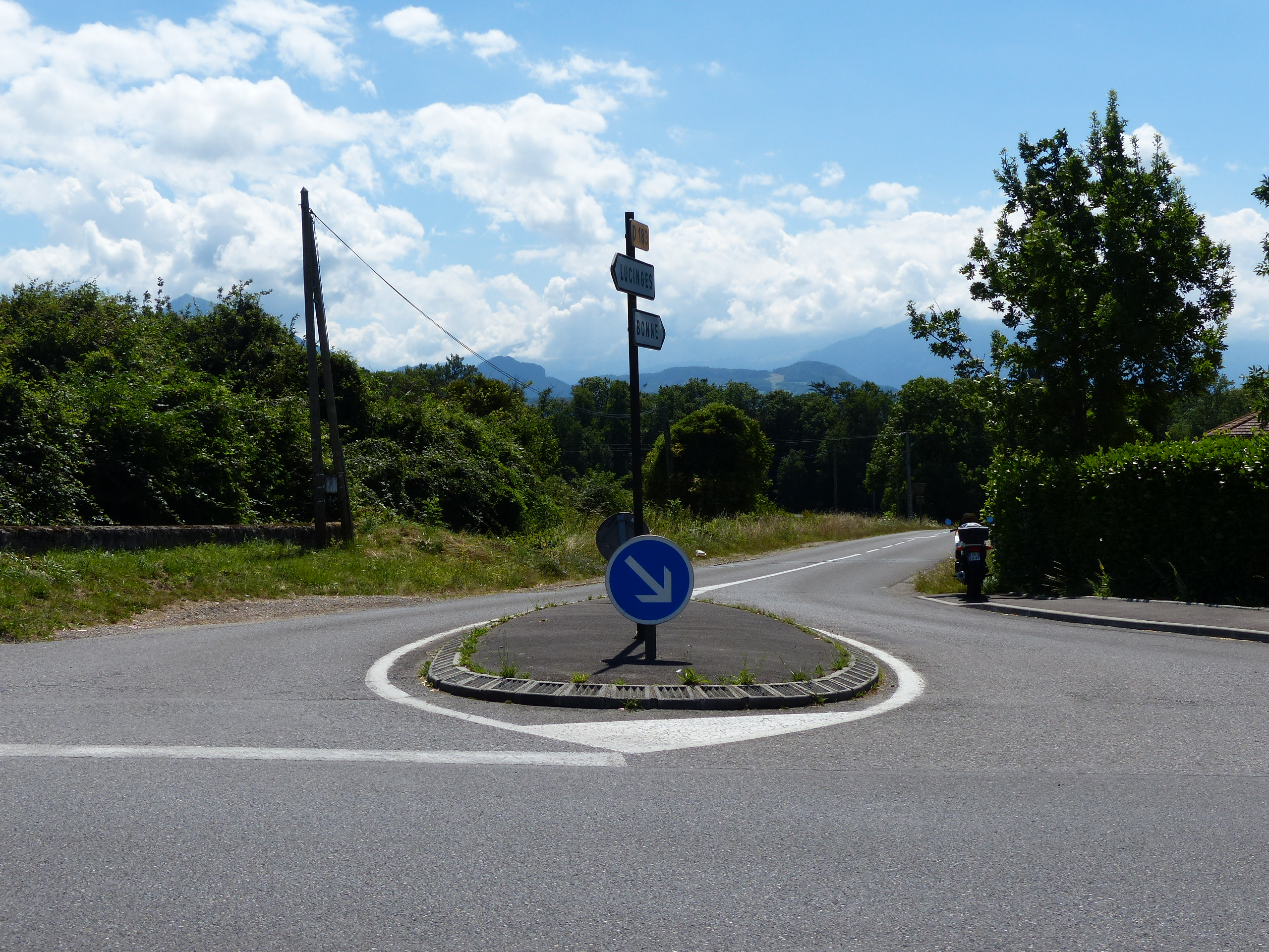 Panneau B21a1 à Cranves-Sales, France